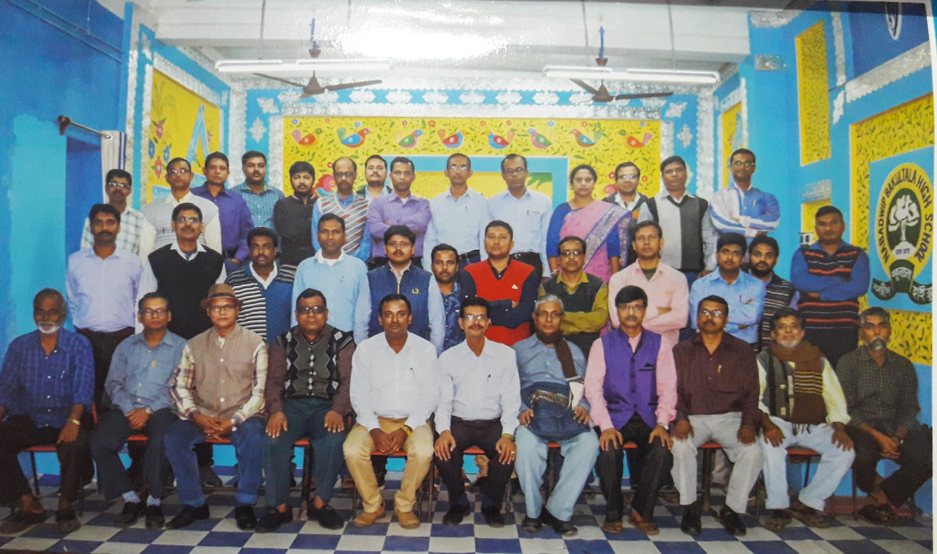 NBHS picture